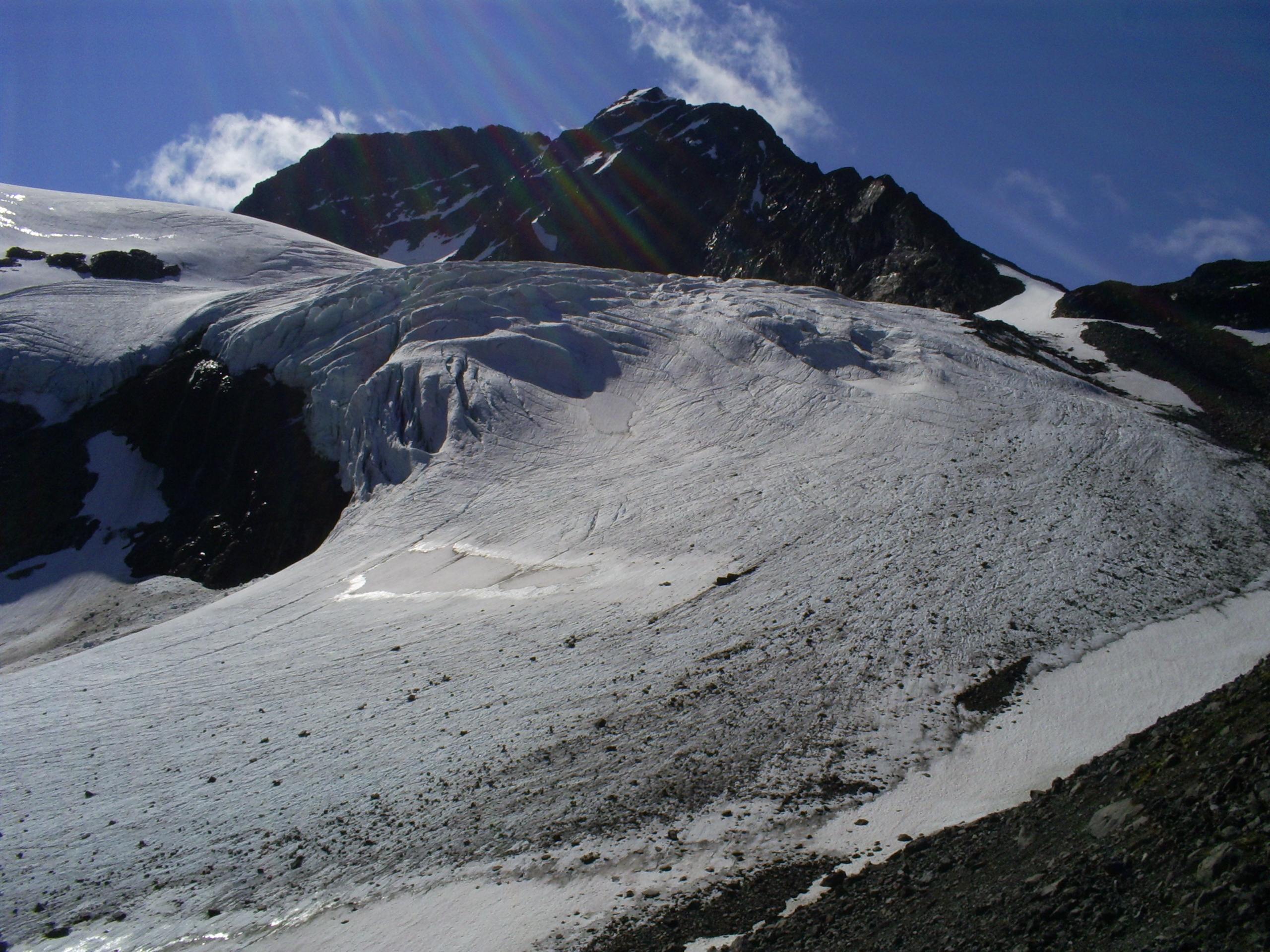 Kebnepakteglaciären, a glacier in Lapland, Sweden. Close to Tarfala and Nikkaluokta.